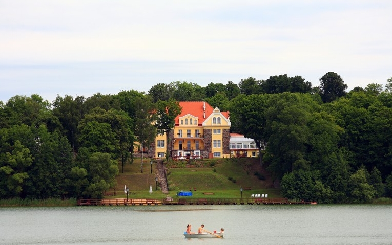 Ublik, województwo warmińsko-mazurskie, powiat piski, gmina Orzysz